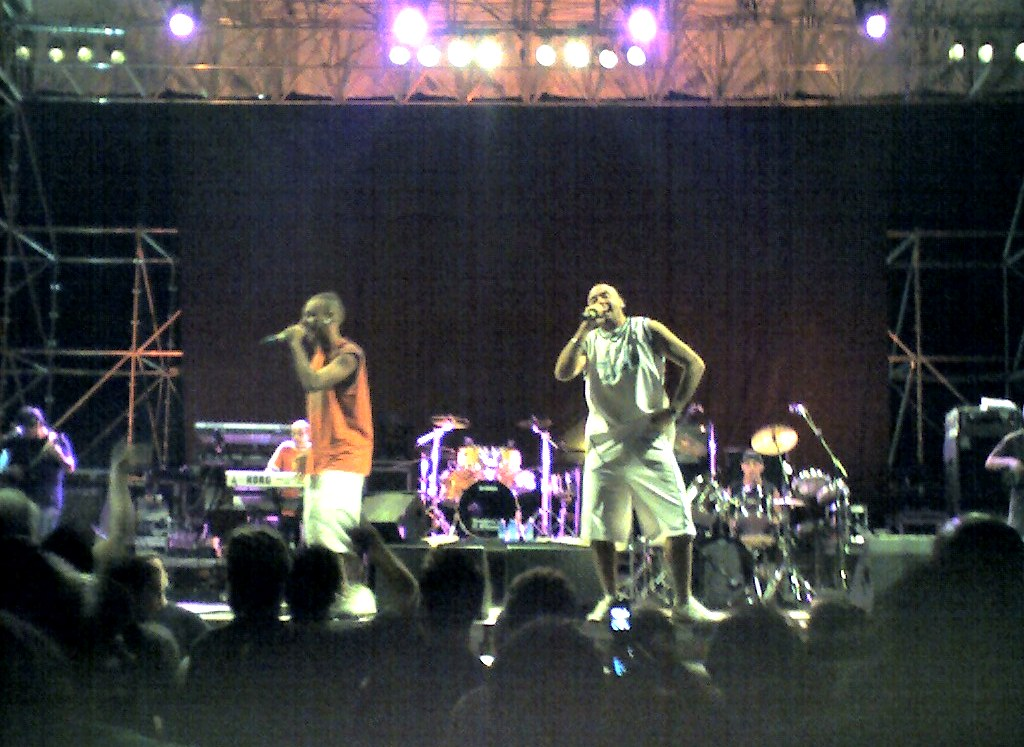 Sud Sound System in concerto ad Arbatax.